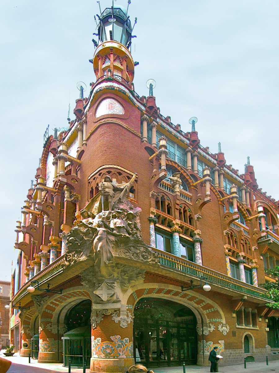 Palau de la Música Catalana, mosaic de fotos